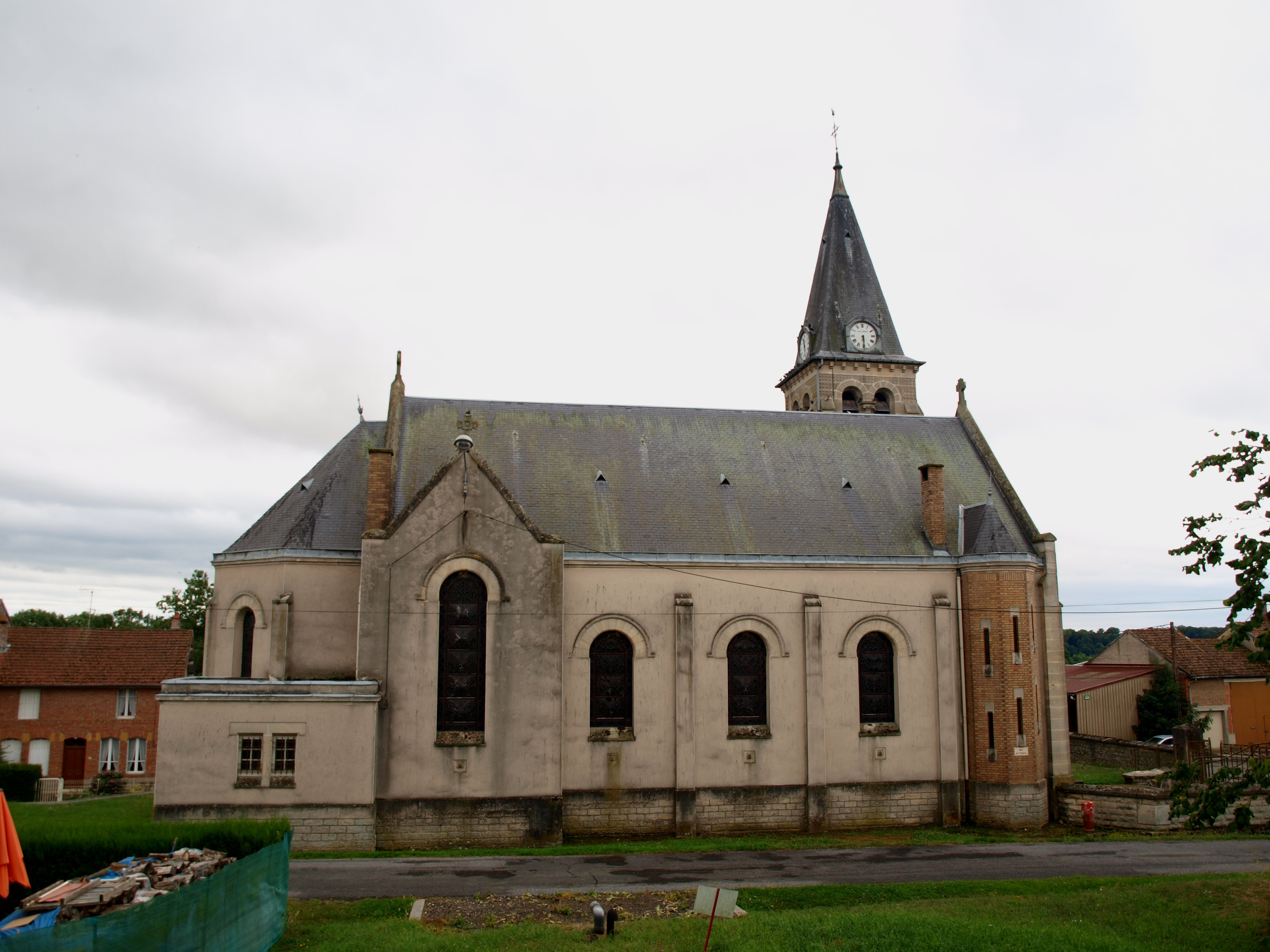 Mouron (Ardennes, France) ; église